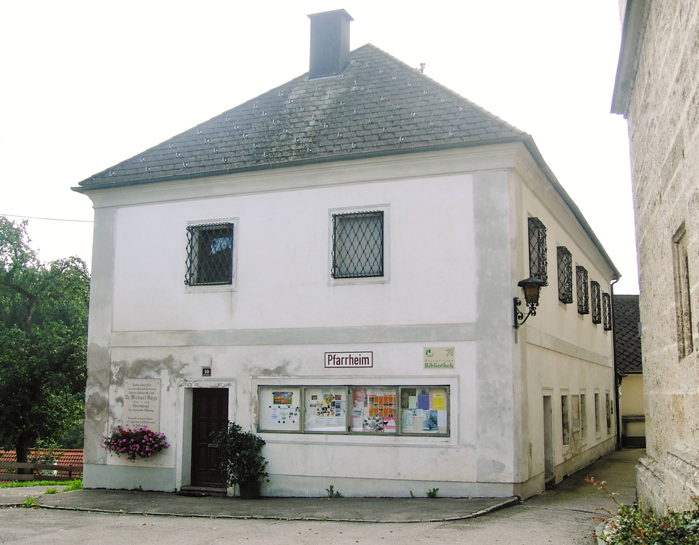 Adlwang Kirchenplatz 10, Pfarrheim, Ansicht von Osten